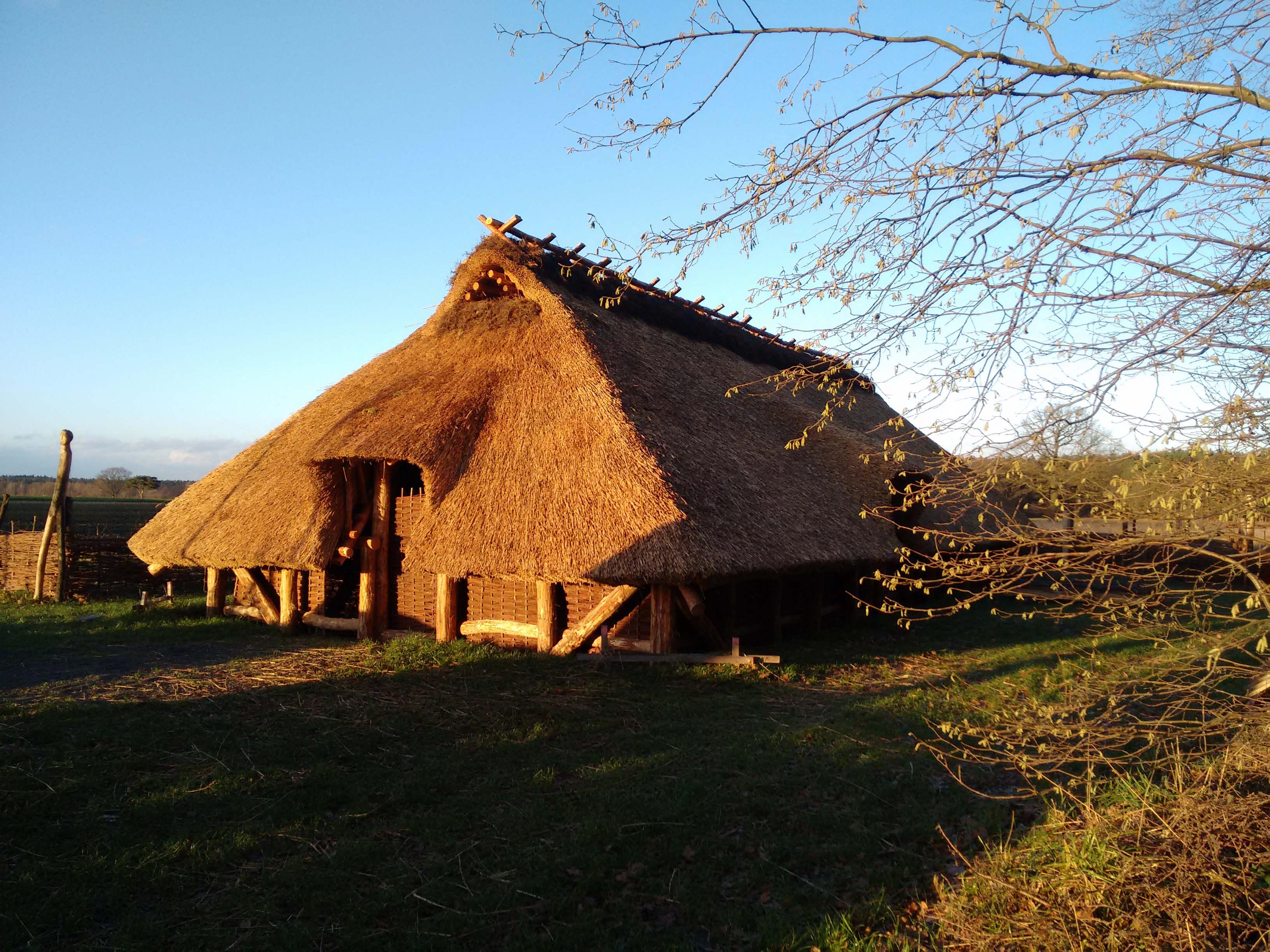 Arpke, Zum Grafhorn 30, Rekonstruktion eines Eisenzeithauses, errichtet im Jahr 2015